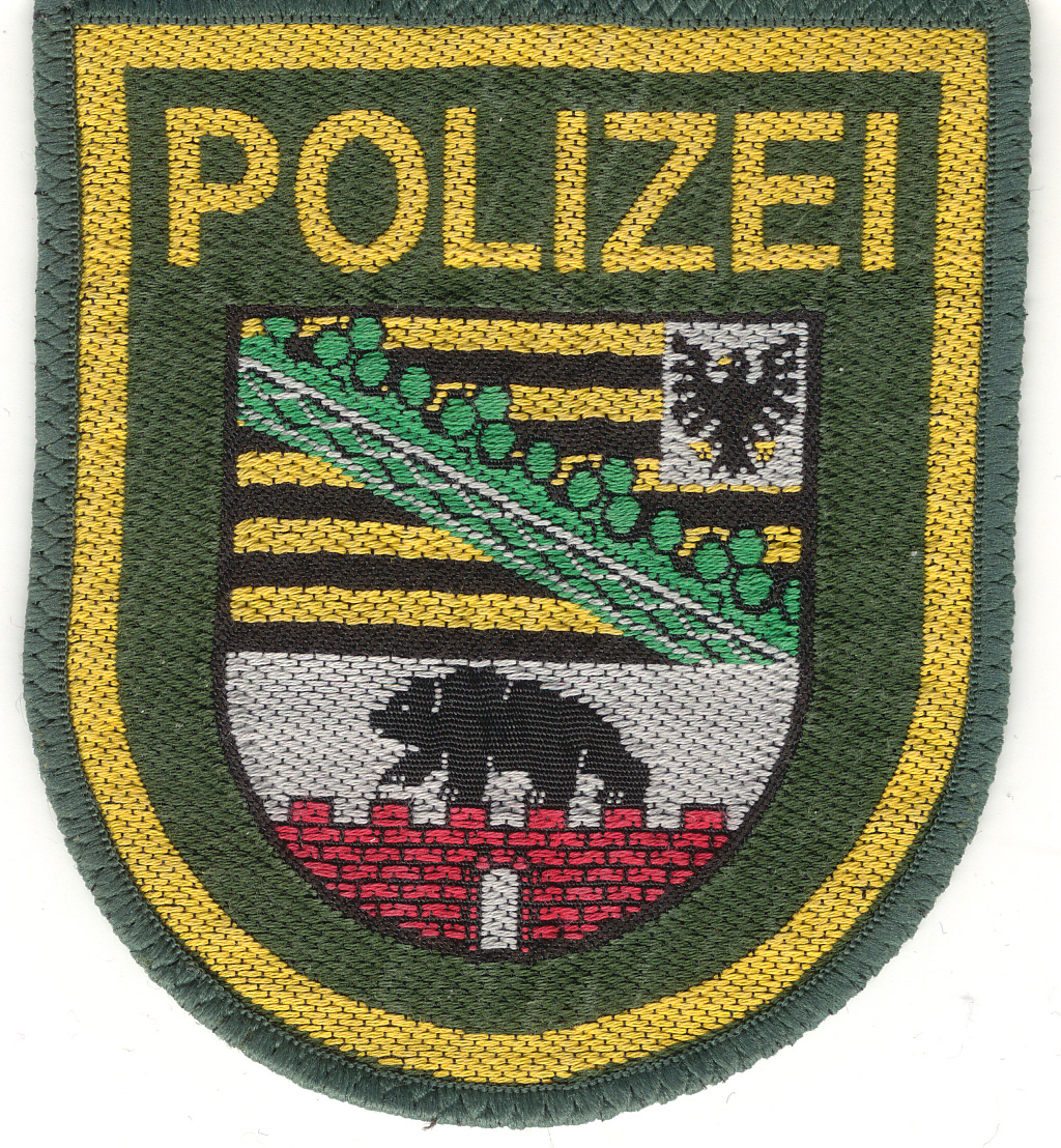 Ärmelabzeichen der Polizei Sachsen-Anhalt